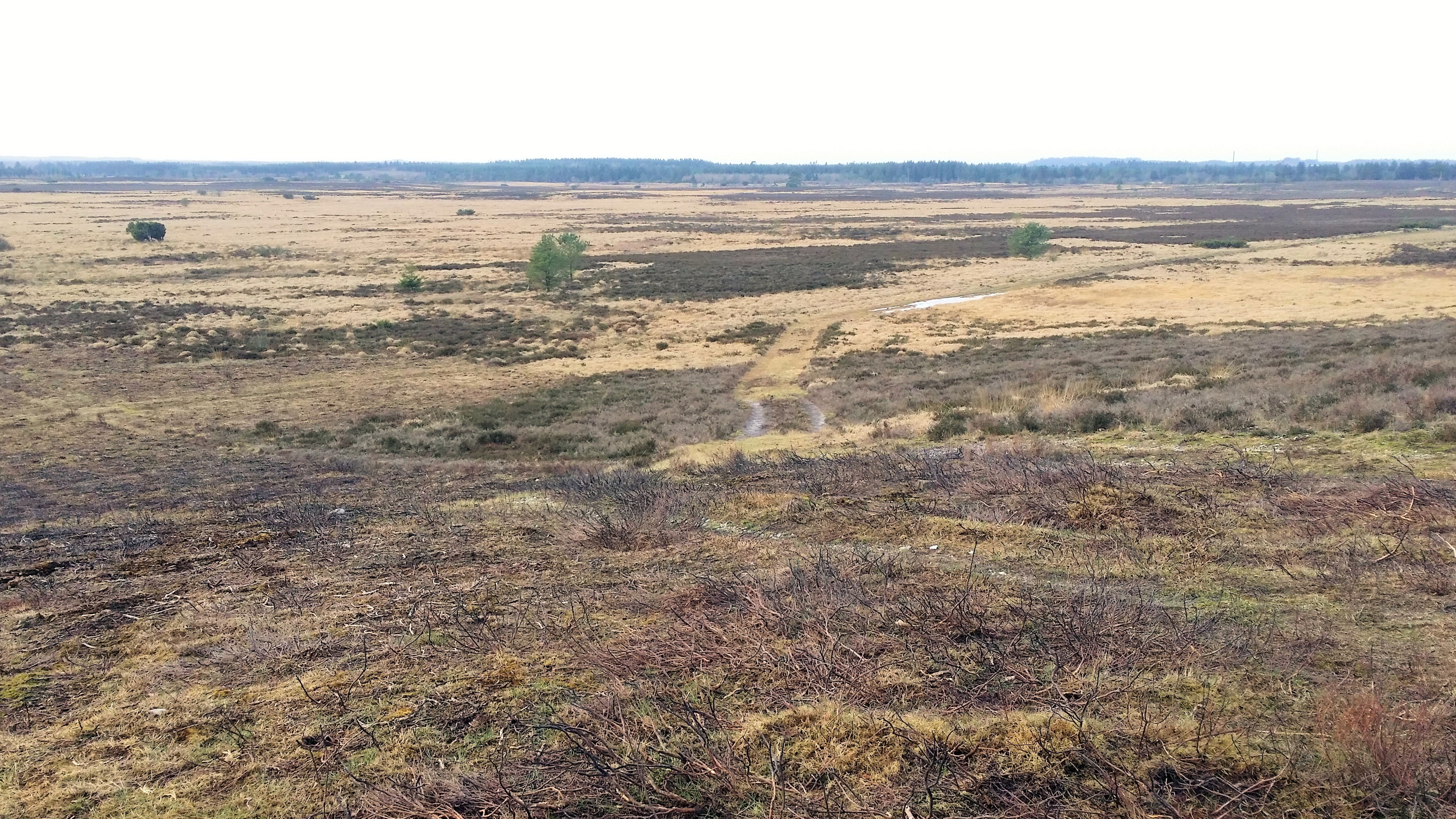 Harrild Hede fotografi fra det højeste punkt på heden.